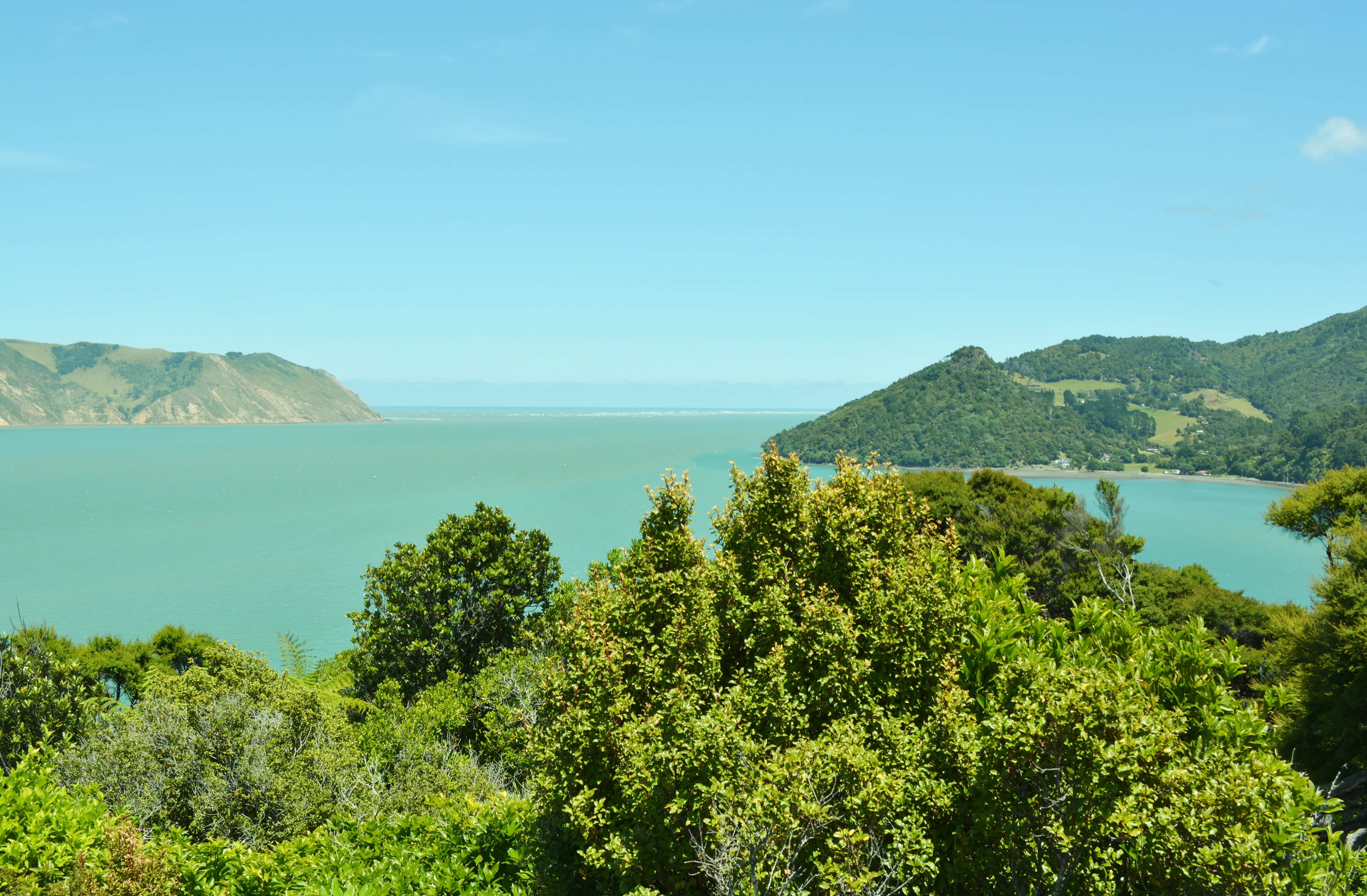 Manukau Heads